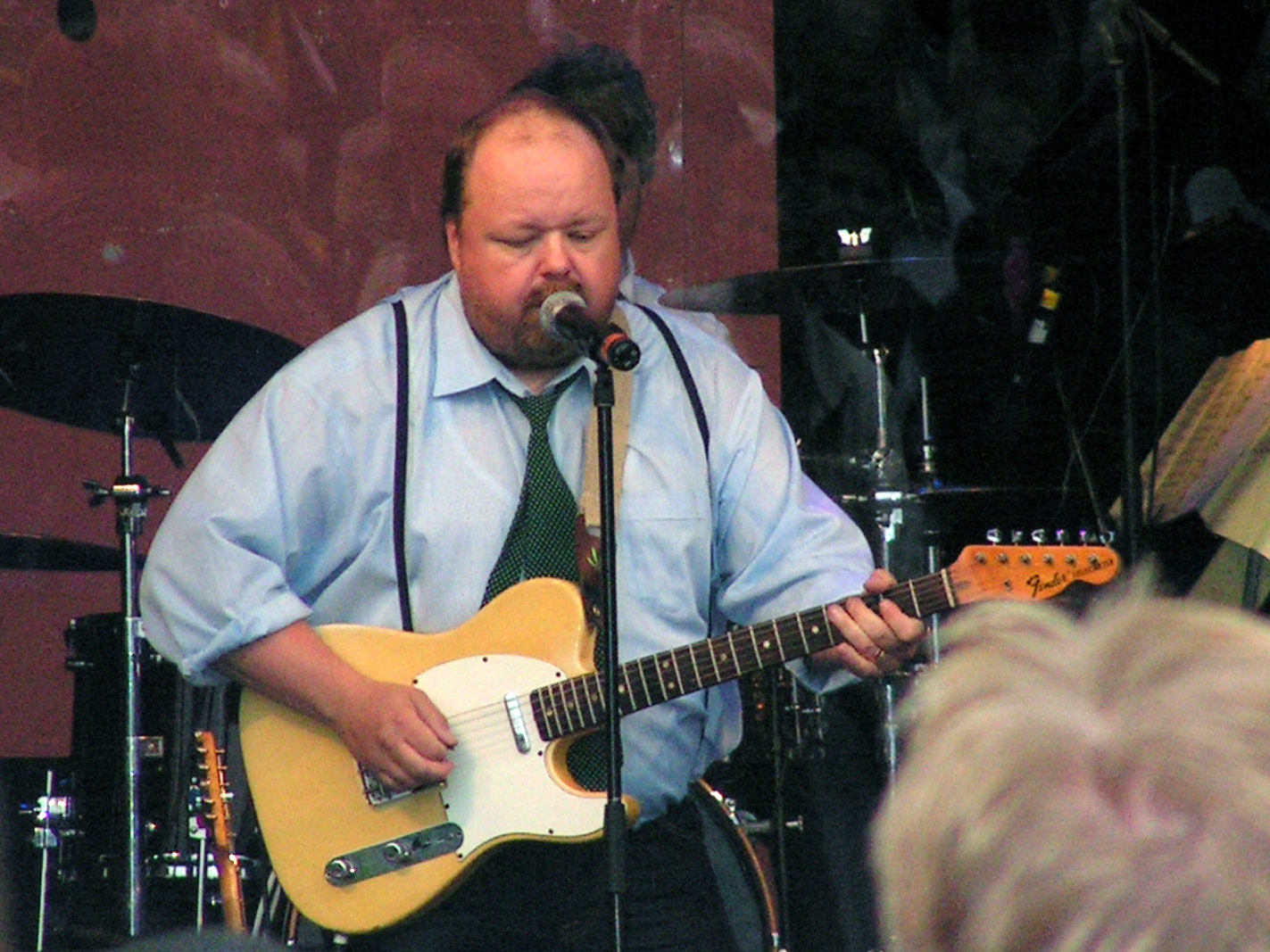 Kalle Moraeus vid Fallens dagar i Trollhättan